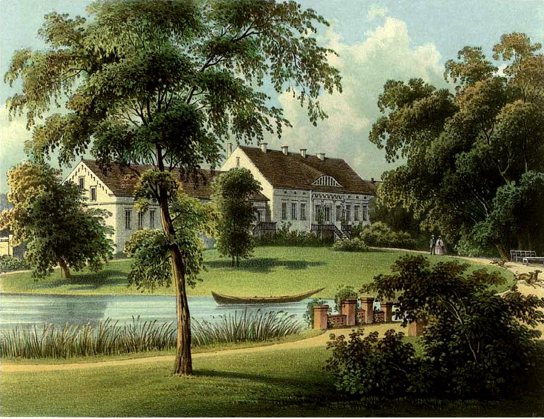 Rittergut Warchau, Kreis Jerichow II, Provinz Sachsen